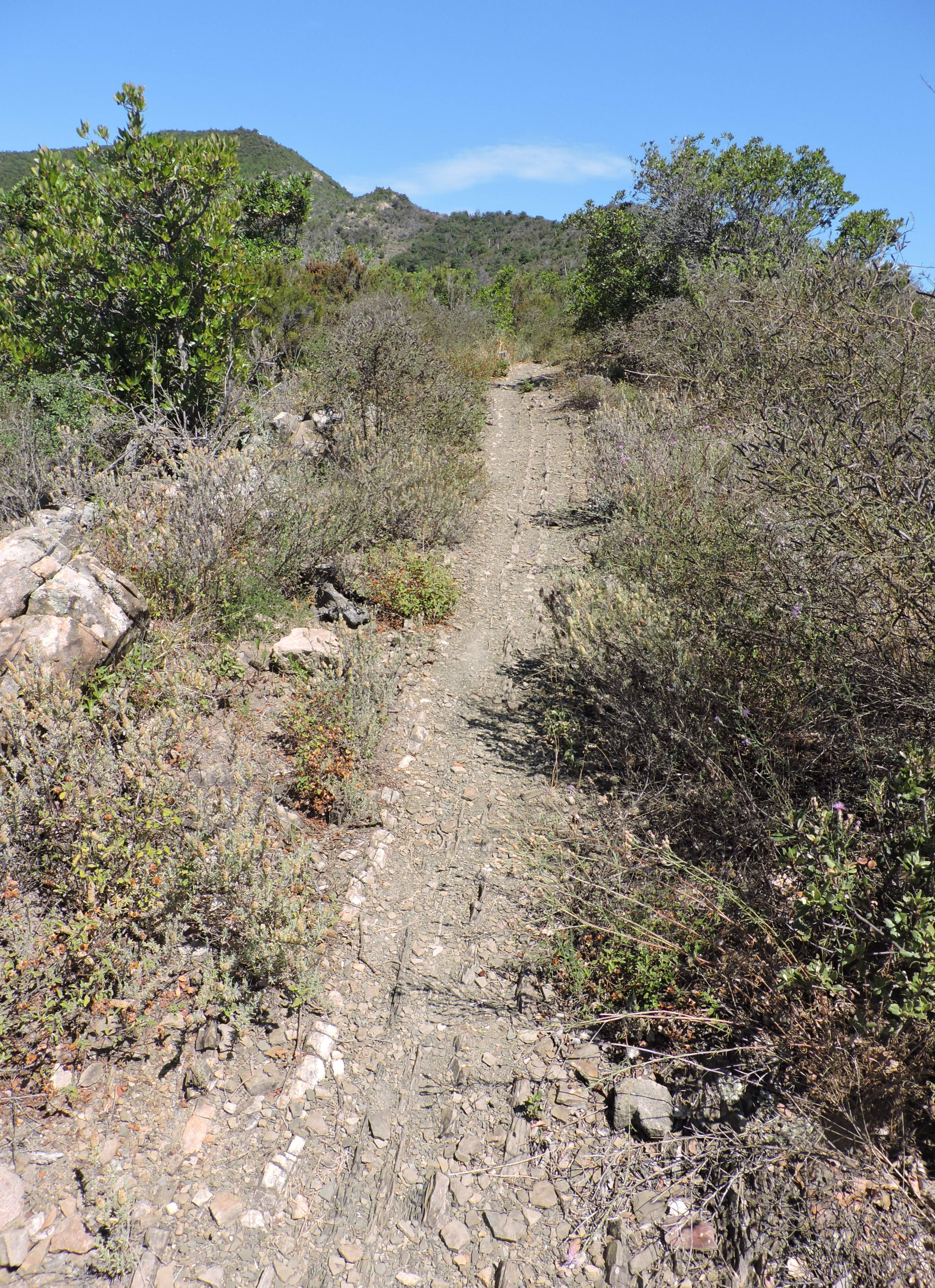 Punta Baffe - Punta Moneglia - Val Petronio (Q55317052)